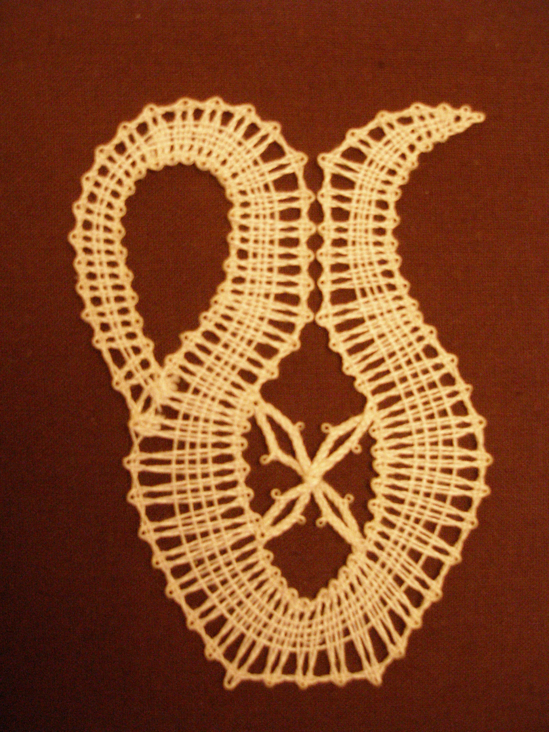 Neznámy umelec: Ďžbán, solivarská čipka